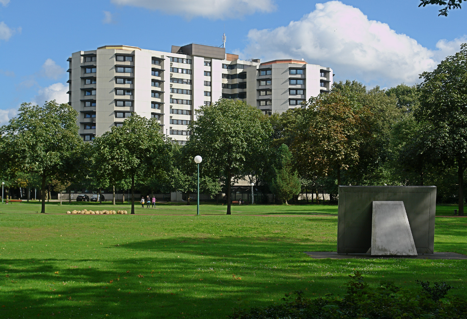 Klinikum Bremen-Ost in Bremen-Osterholz. Westseite. Park mit Installation „Rollfeld II“ (Kugeln) und Denkmal „Irrstern“ (Rückseite)